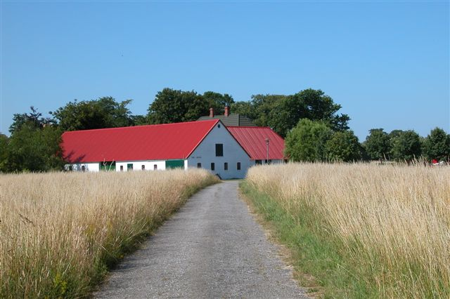 Hjortø